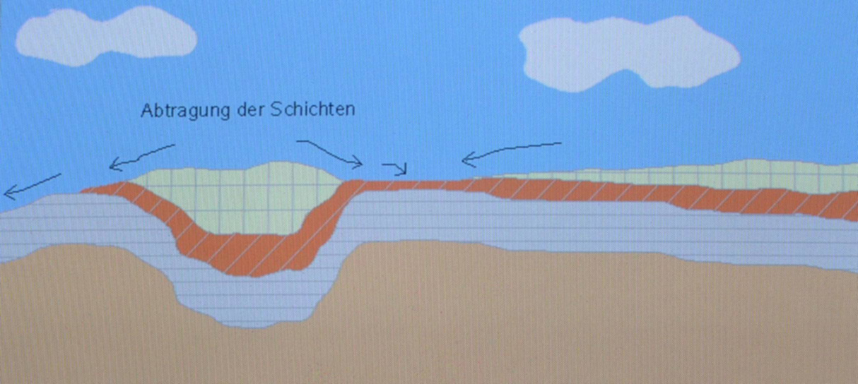 Gesteinsabtragung durch Erosion